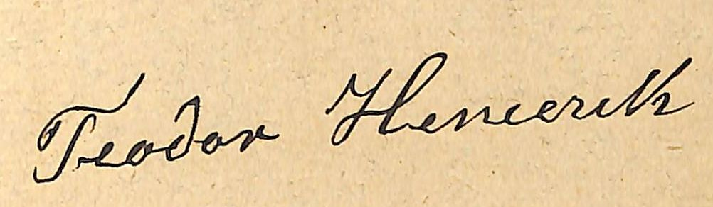 Autograf Teodora Heneczka na dokumencie z 1888 r. z Archiwum Państwowego w Przemyślu. Nr zespołu 2400, sygn. 882.